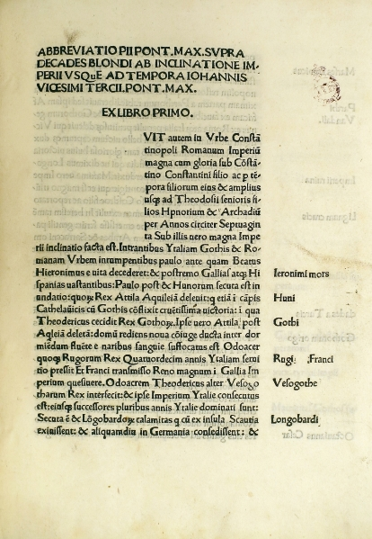 Pius II, Abbreviatio supra decadas Blondi page 1